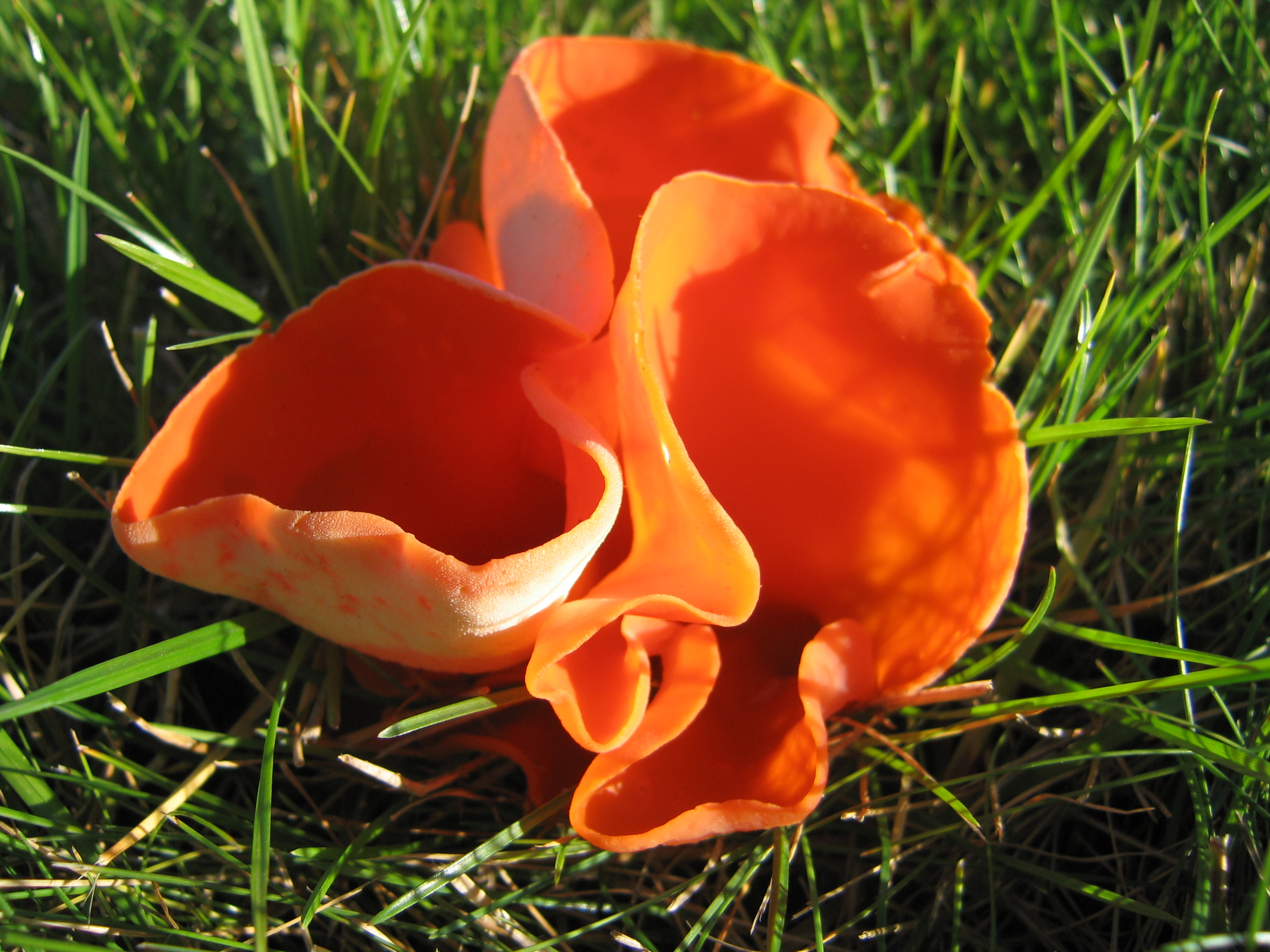 Aleuria aurantia (LT: Oranžinis lekščiagrybis)